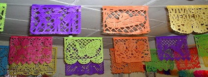 Muestra de banderitas de papel picado